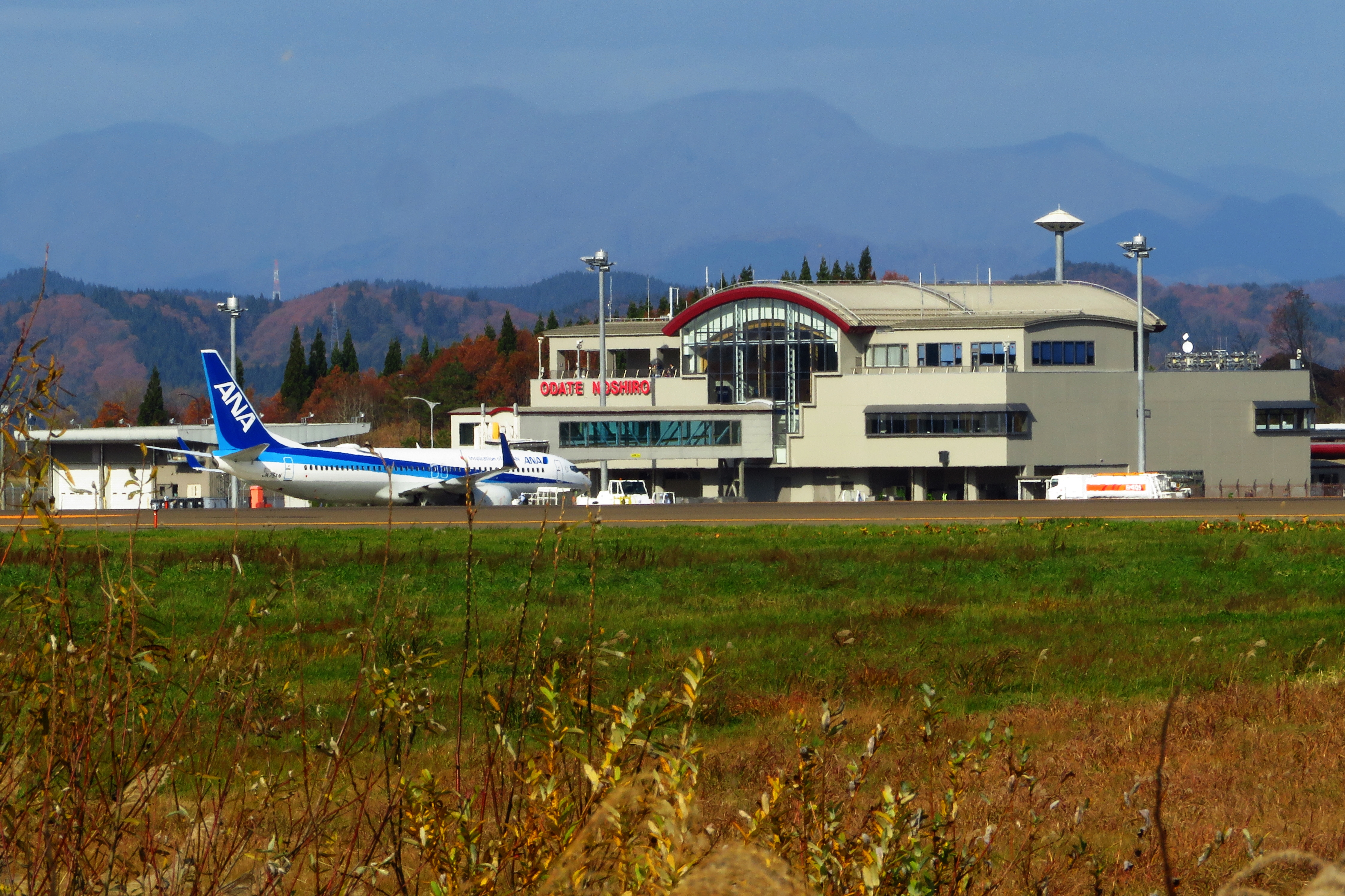 大館能代空港：秋田県北秋田市 Canon PowerShot SX720 HS